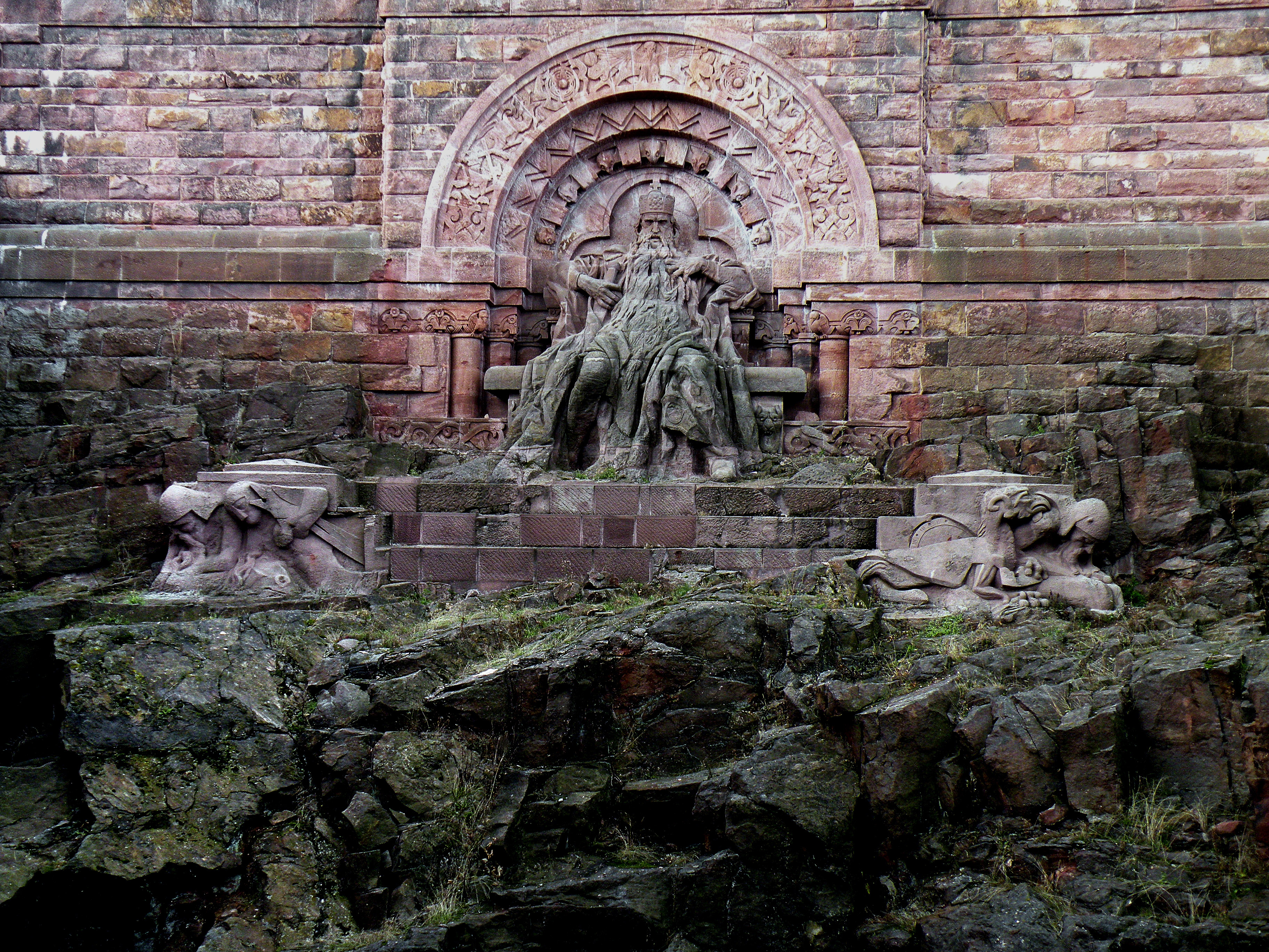 Памятник Фридриху Барбароссе в Кифхаузене